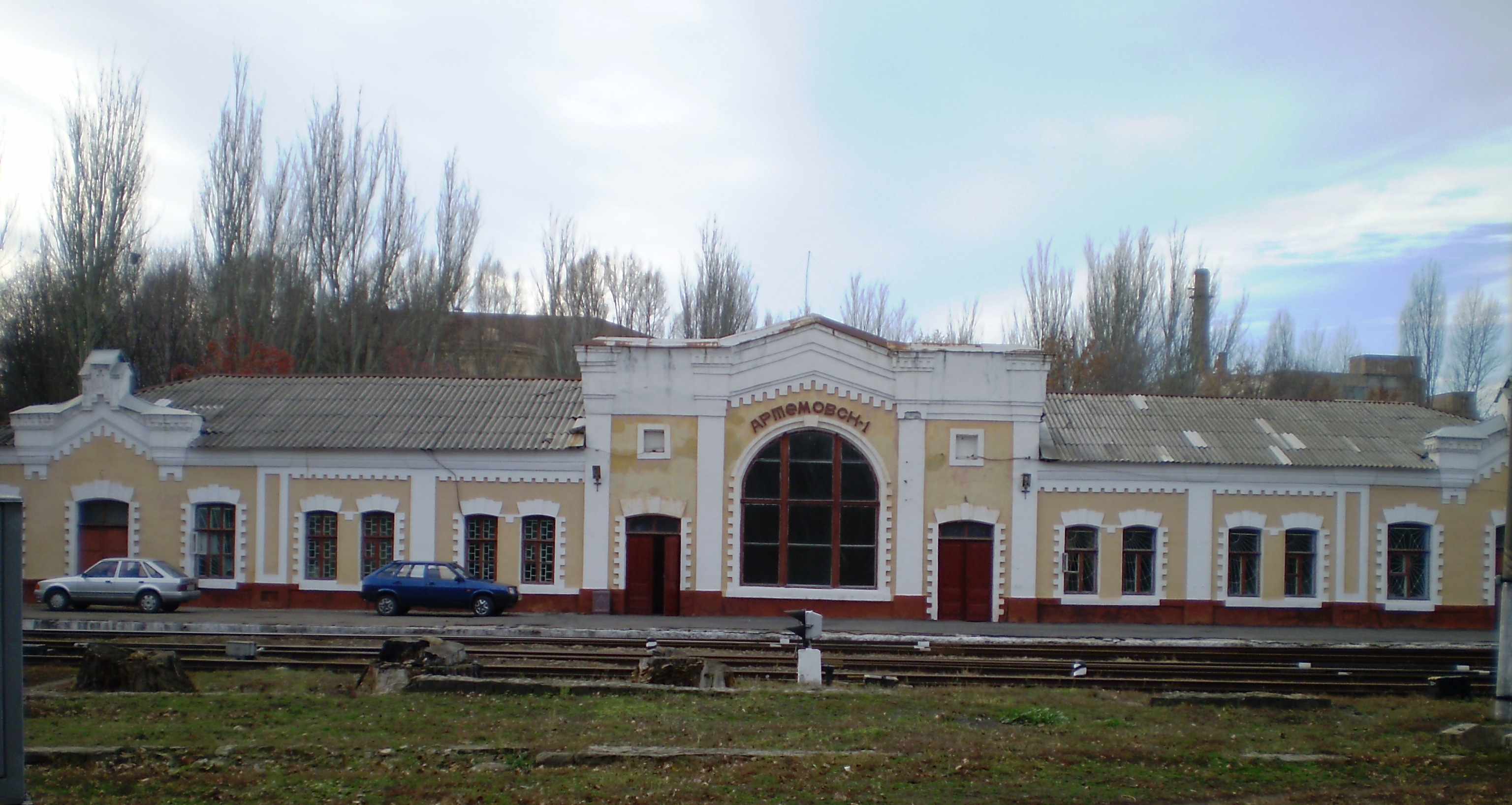 Южный вок